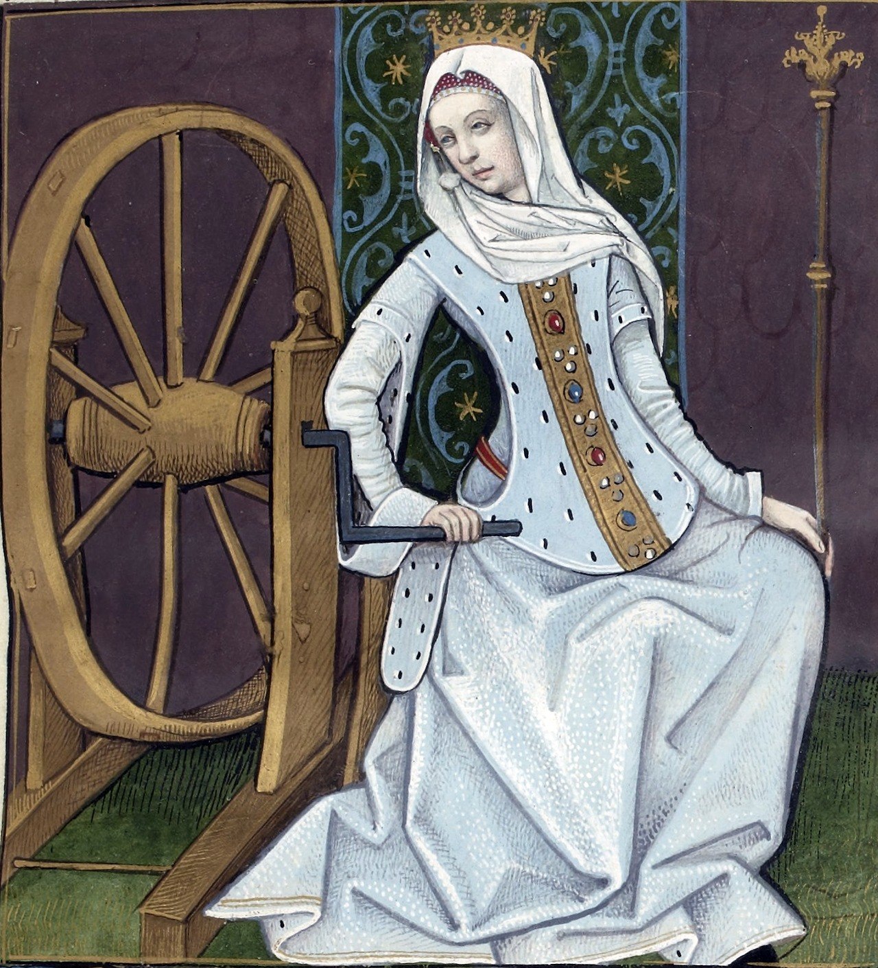 Fortune dans un manuscrit enluminé des Échecs amoureux (XVe siècle).